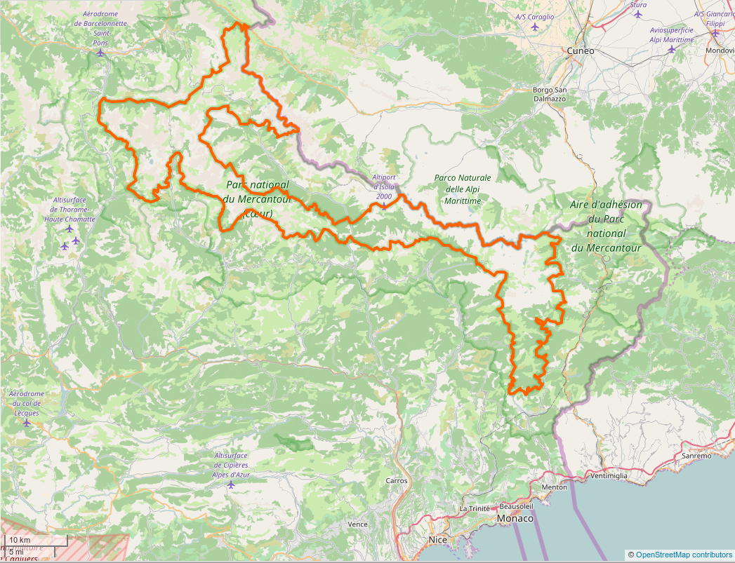 Périmètre du coeur de parc du Parc national du Mercantour.